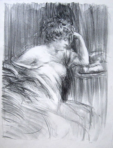 Lithographie d'Albert de Belleroche; La Méditation (portrait de Lili Grenier), 1904.